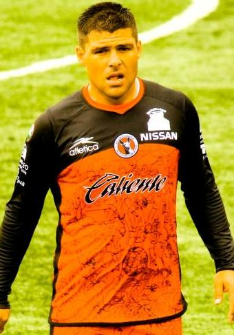 partido disputado el 7 de marzo del 2010 en el estadio caliente de tijuana entre los xolos vs lobos buap para la jornada 10 de la liga de ascenso del futbol mexicano. mas info, cronica y fotos en